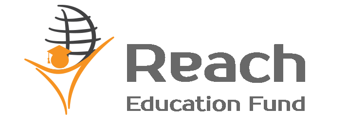 شعارالمؤسسة